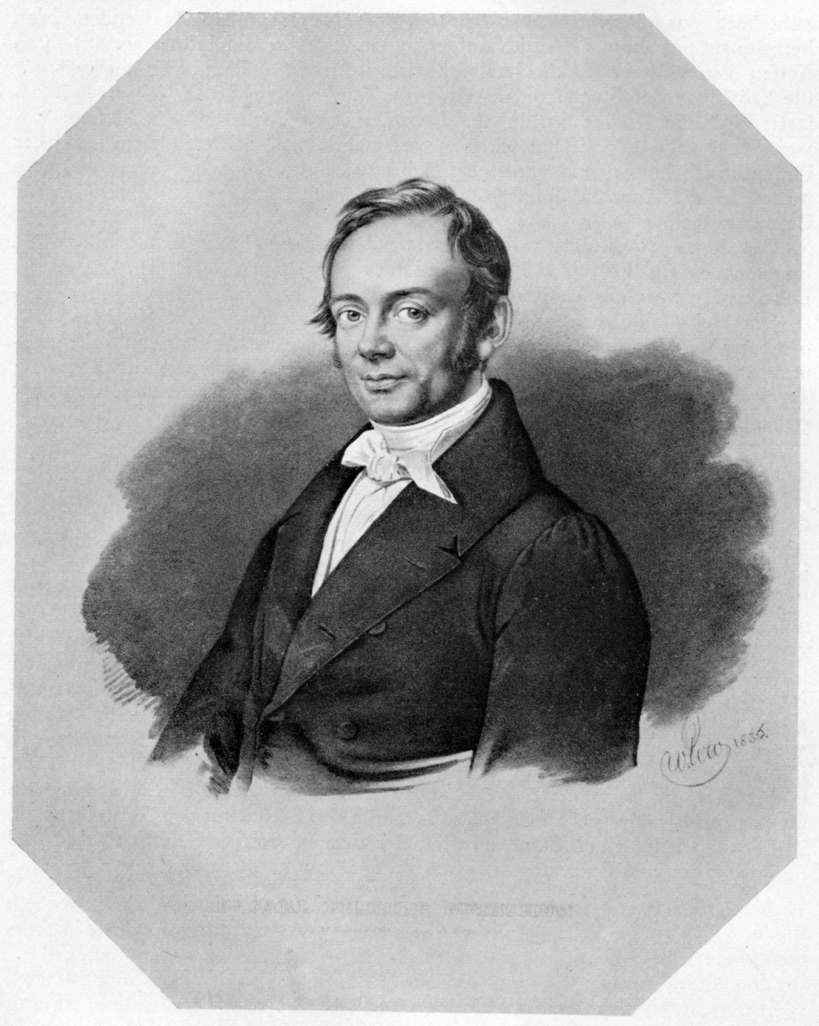 Carl Philipp Gütschow (* 26. Januar 1794 in Lübeck, † 13. November 1838 ebenda), Lübecker Mediziner und erster Arzt der Lübecker Irrenanstalt; Lithographie, 30,6 x 24,2 cm, nach 1836, Johann Nepomuk Strixner (1782-1855) nach Zeichnung von Wilhelm Pero (1808-1862)